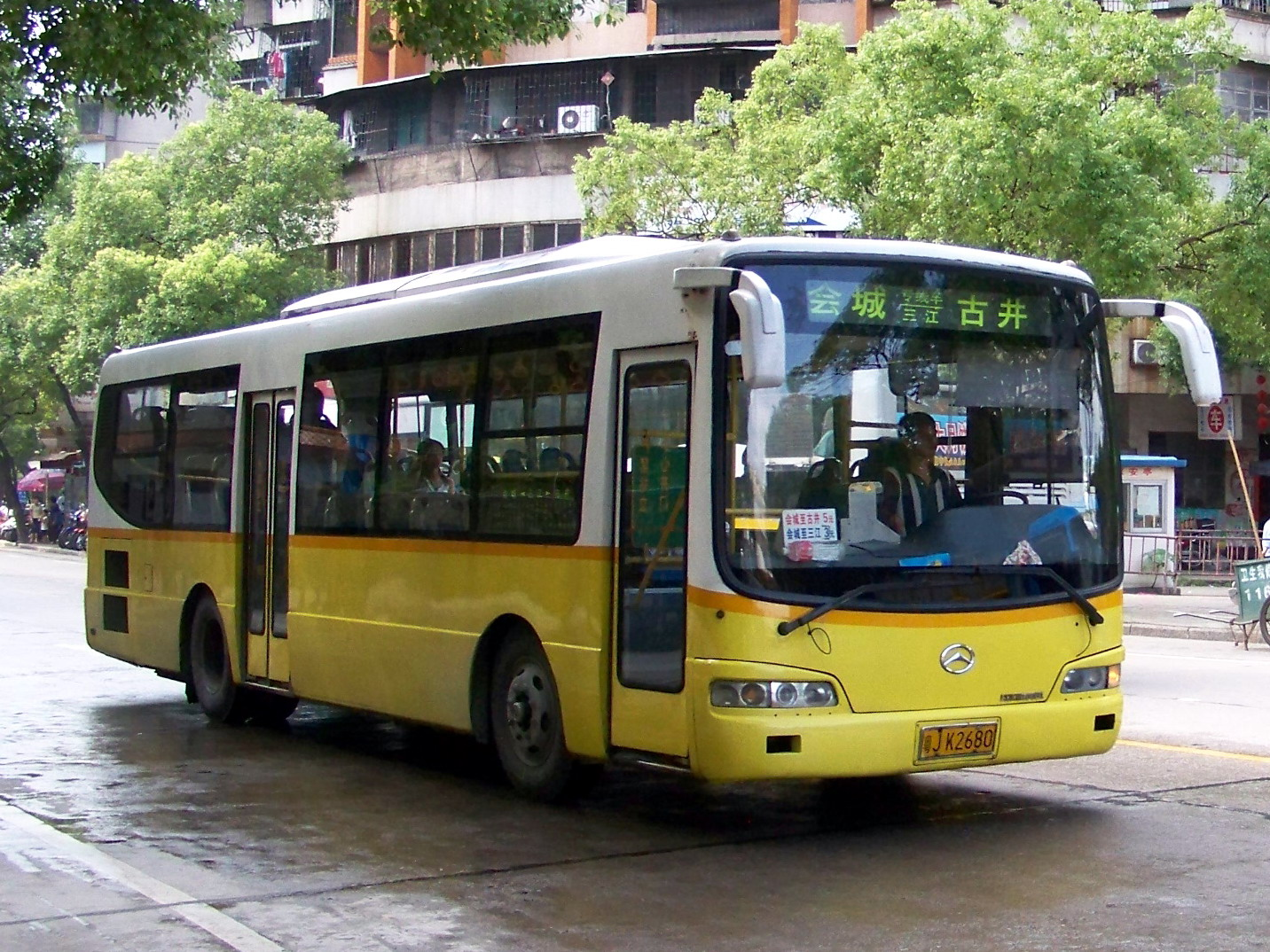 会城至古井公交车